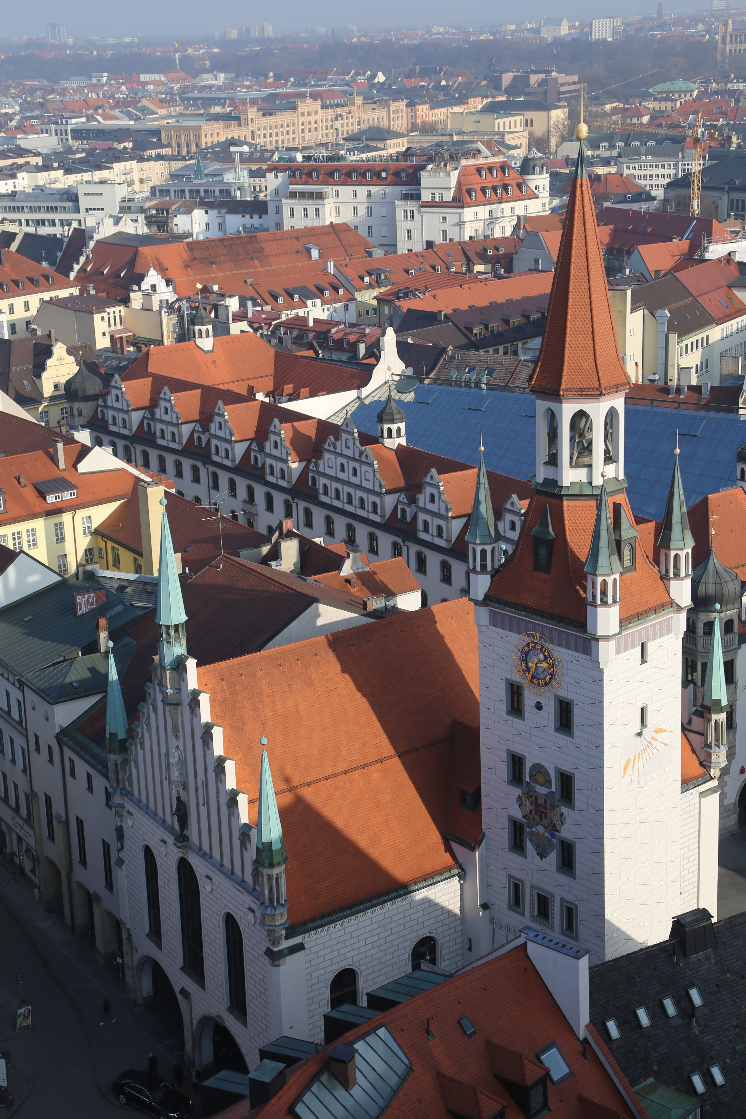 Blick von St. Peter auf das Alte Rathaus, München